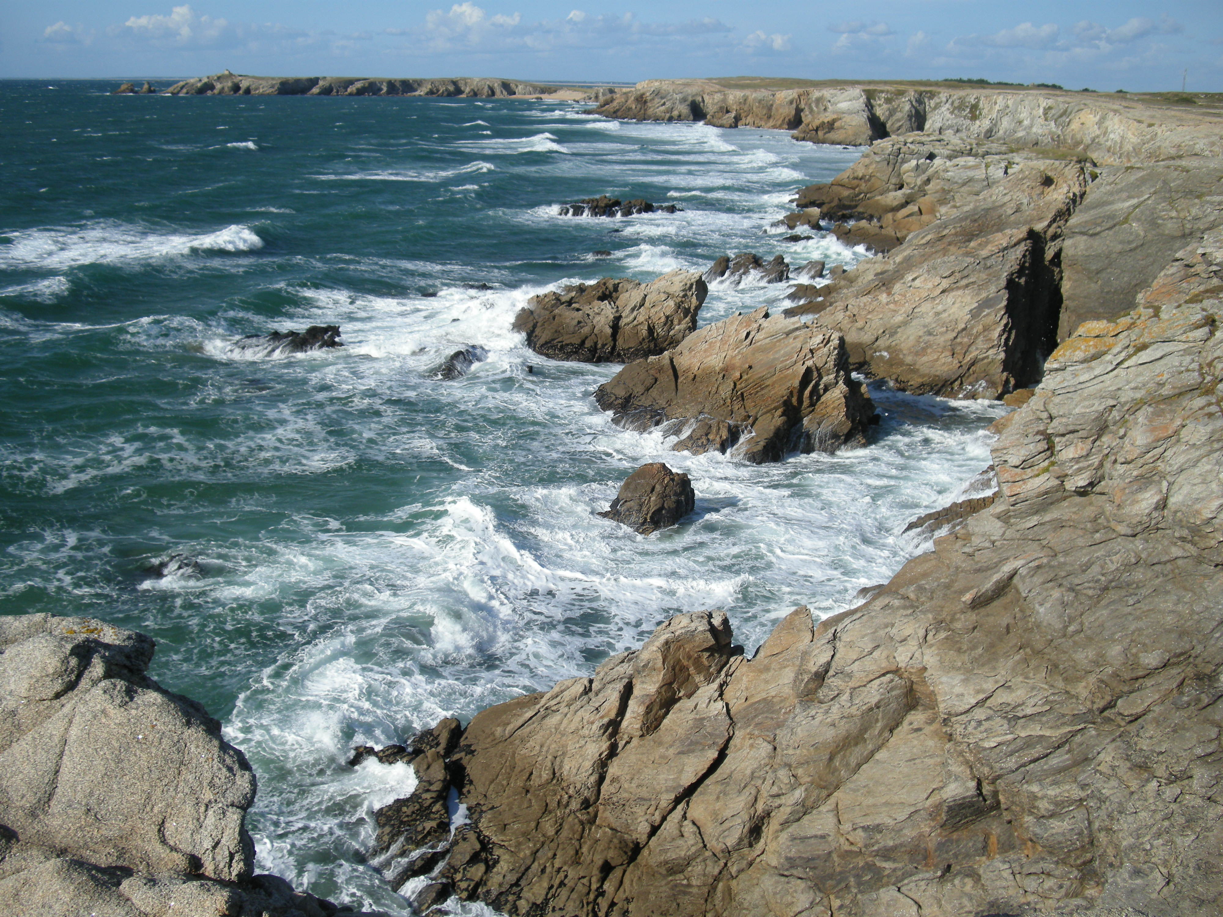 La Côte Sauvage, Presqu'île de Quiberon dans le Morbihan (France). Vue montrant la Pointe du percho.